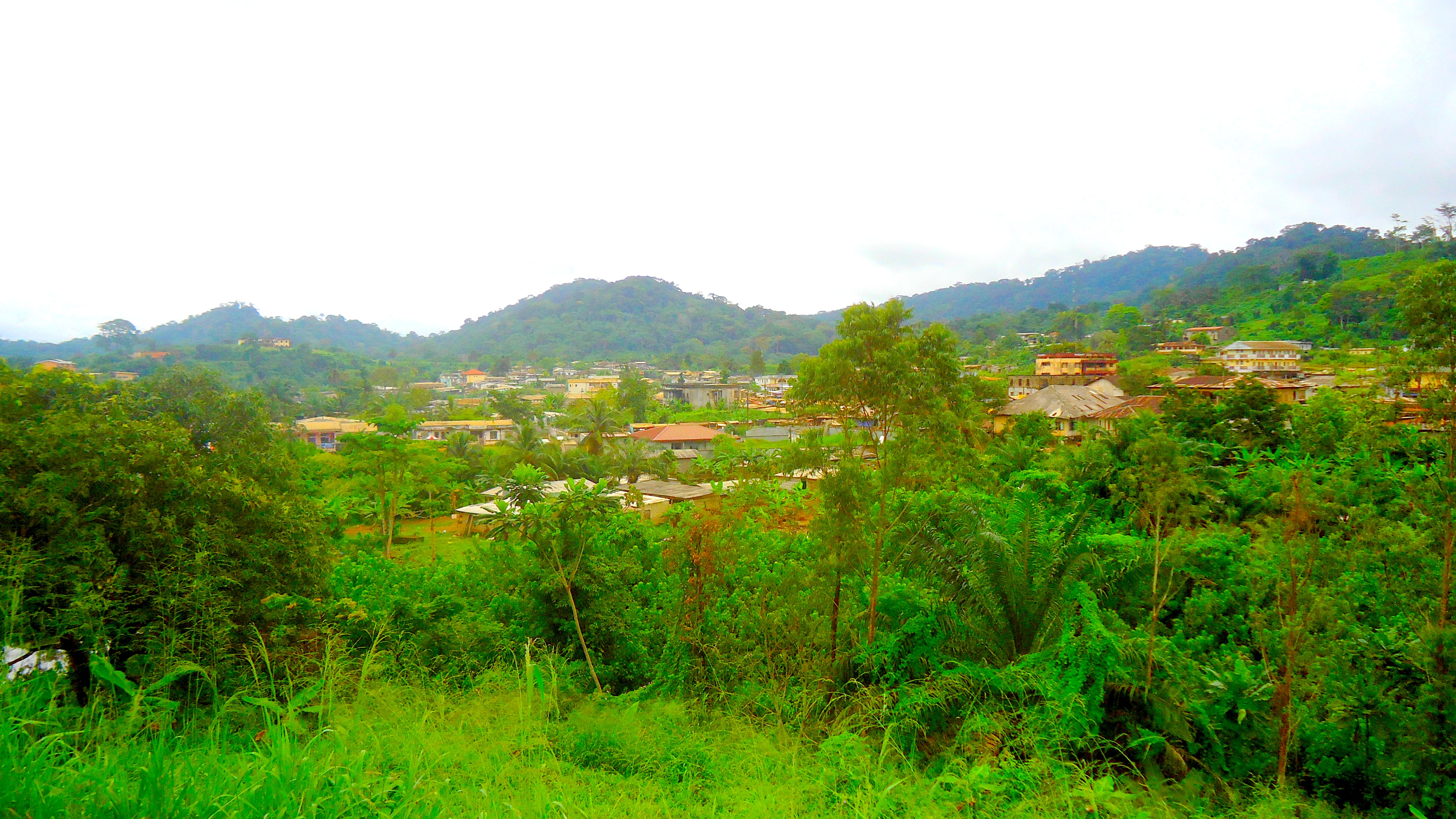 Cette image représente une vue au loin des montagnes à Eséka, locaité située dans le département du Nyong-et-Kellé, région du Centre.